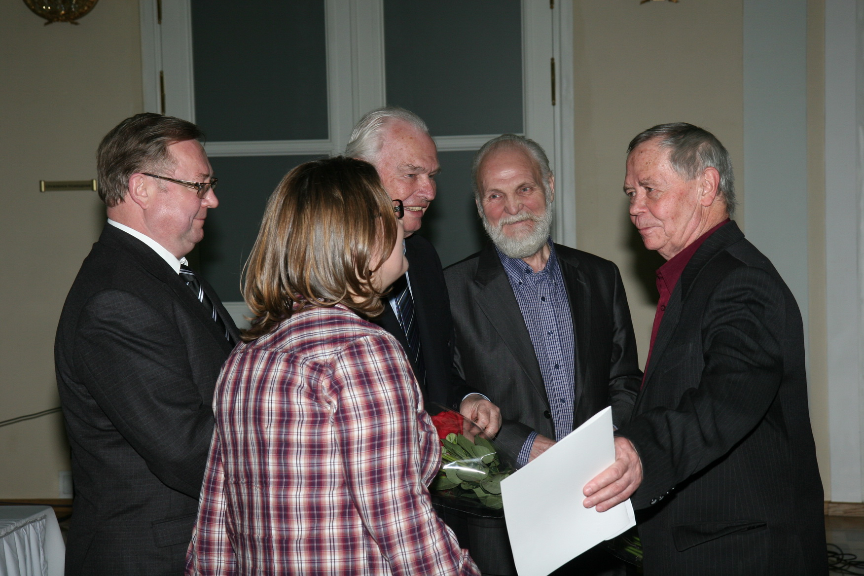 1-го декабря 2011 года в Российской Государственной библиотеке («Дом Пашкова») состоялась торжественная церемония вручения Большой литературной премии России за 2011 год